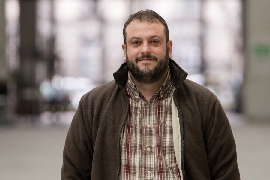 Concejales de Ahora Madrid elegidos en las elecciones de 2015